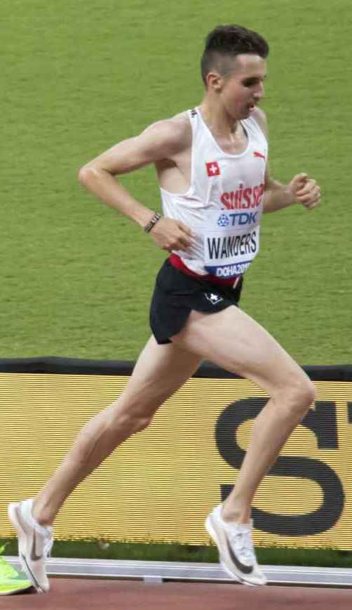 DOH90088 10000m bouchiki